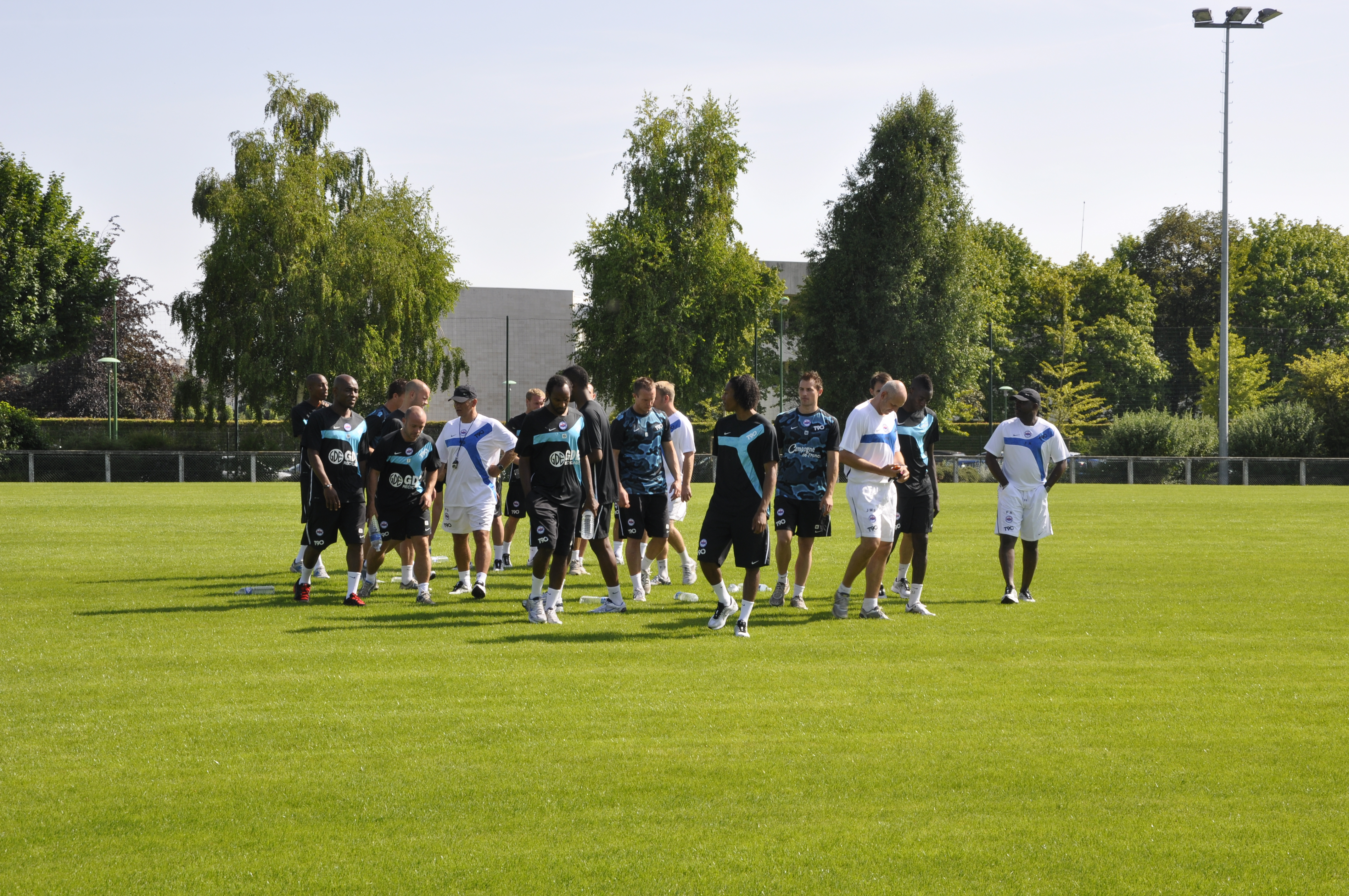 premier entraînement du Stade Malherbe de Caen de la saison 2011-2012 le 27 juin 2011